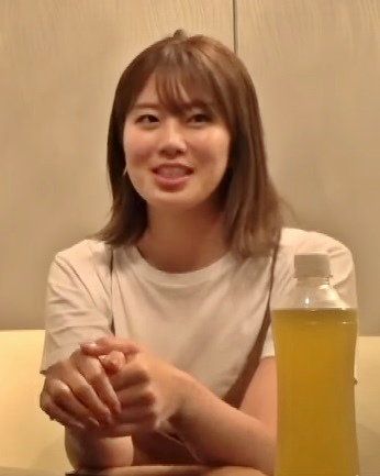 高木豊のYouTubeチャンネルに出演する神スイングの稲村亜美